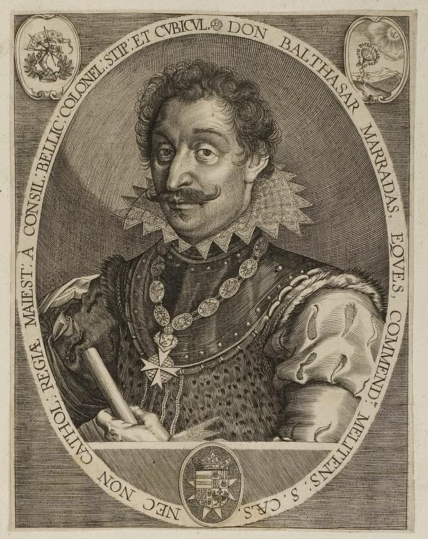 Grafik aus dem Klebeband Nr. 1 der Fürstlich Waldeckschen Hofbibliothek Arolsen Motiv: Baltasar von Marradas